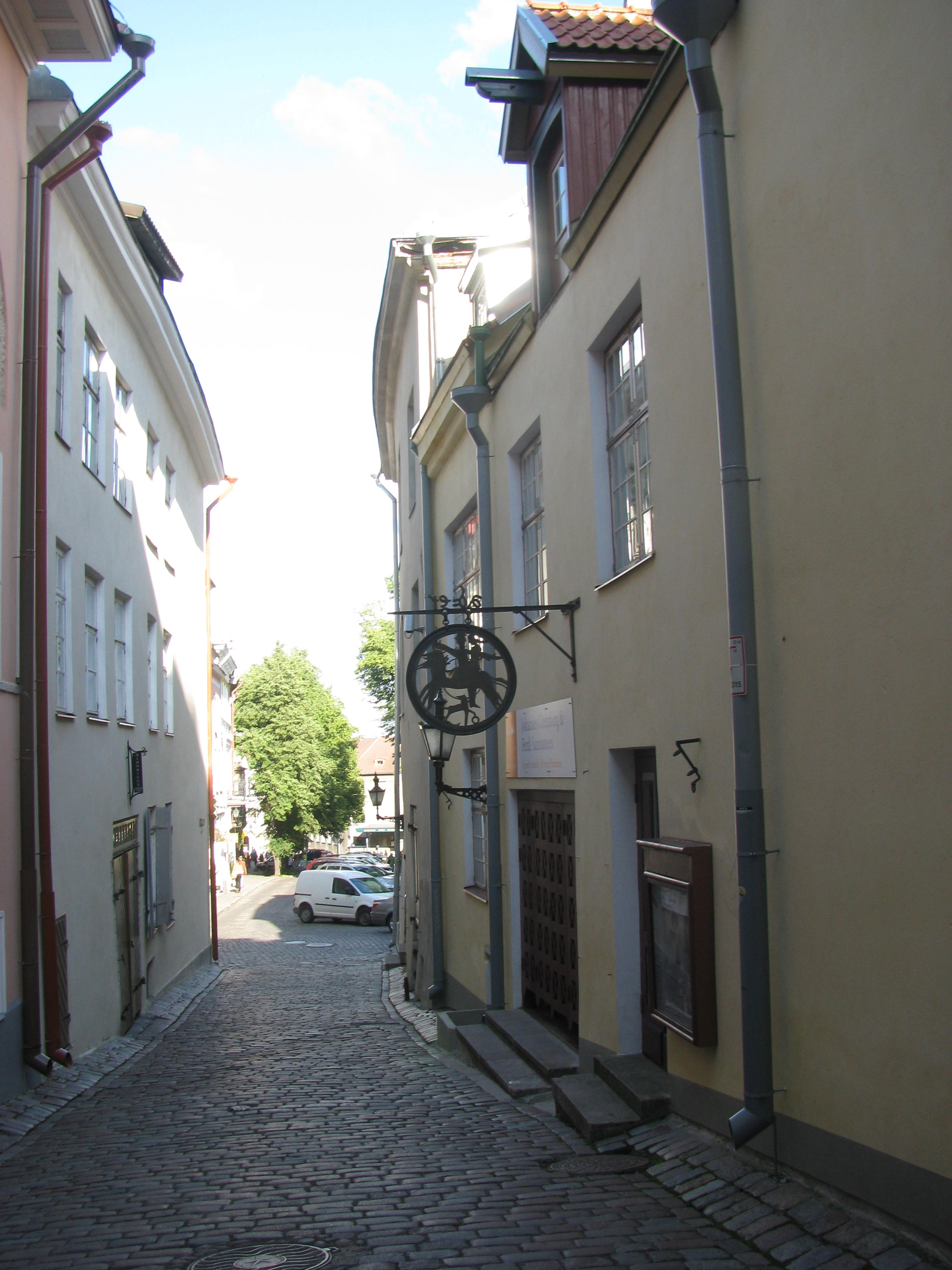 Adamson-Ericu majamuuseum, Lühike jalg 3.